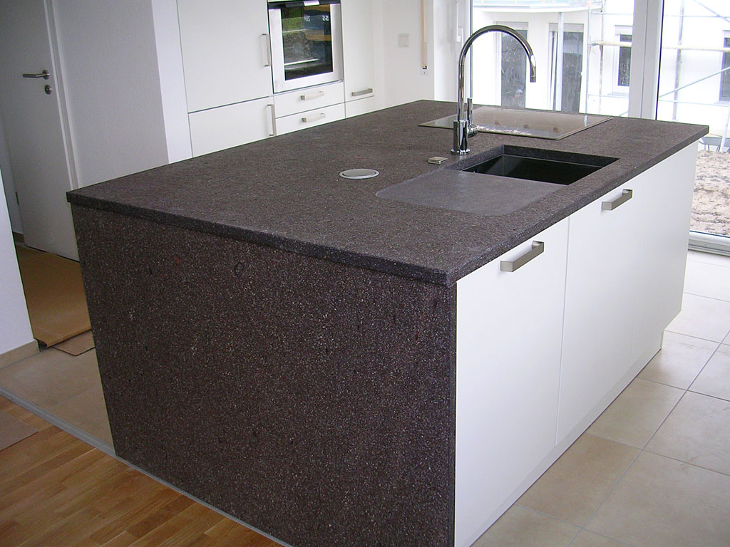 Kücheninsel mit Porphyr-Arbeitsplatte